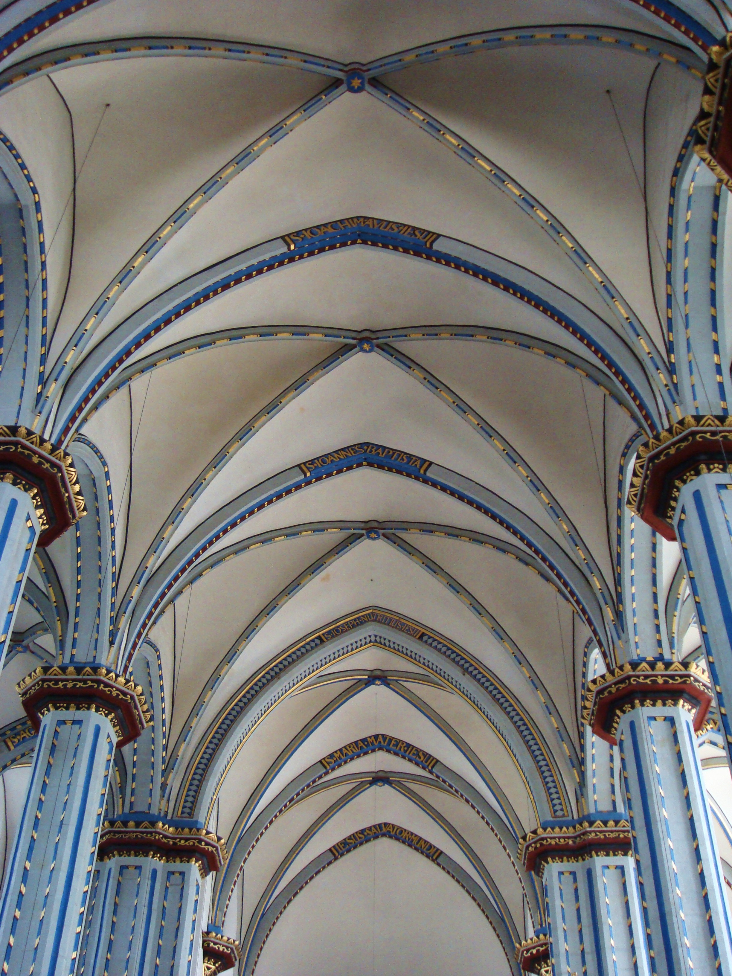 Innenansicht der Namen-Jesu-Kirche in Bonn